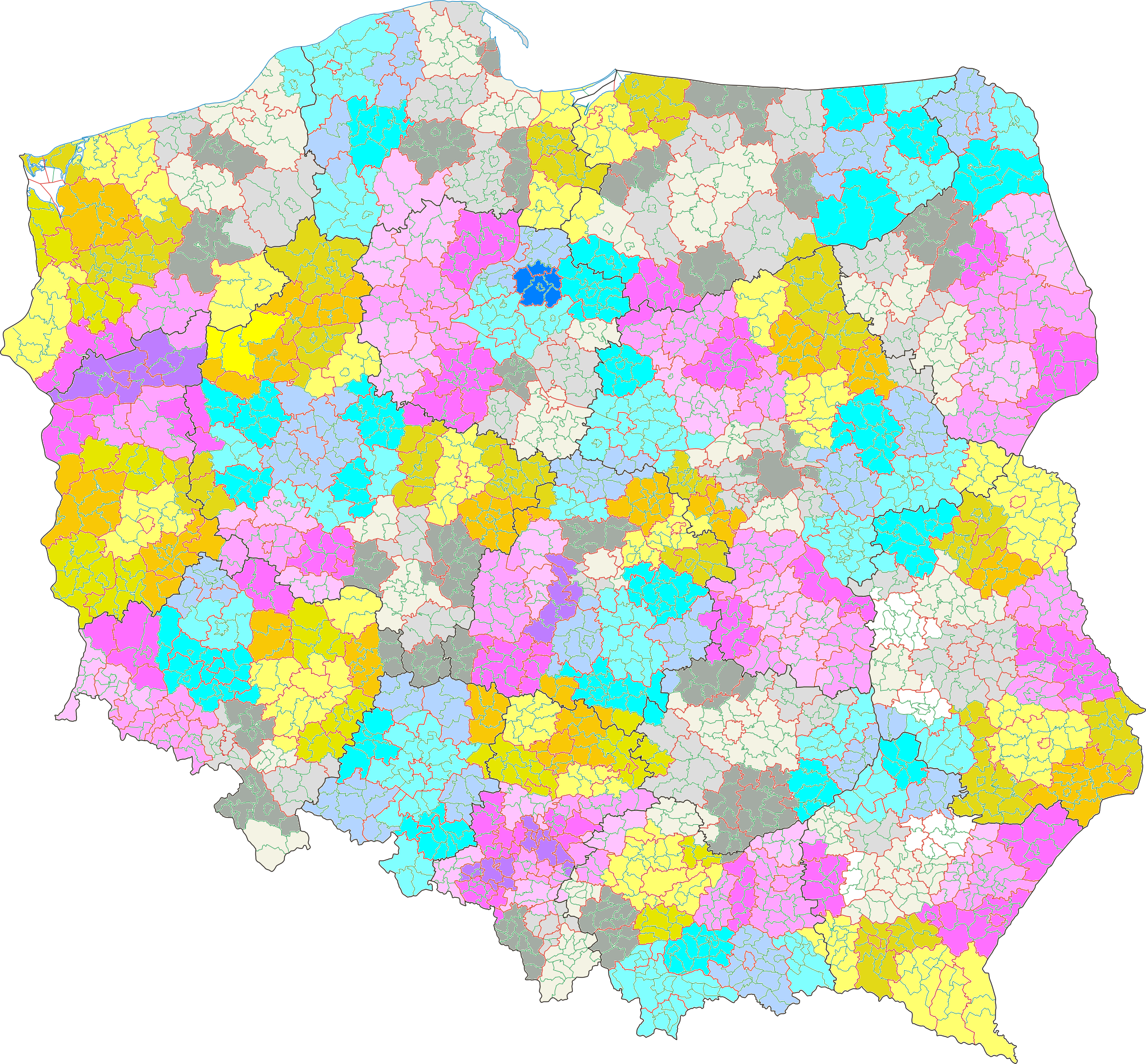 Rejony funkcjonujące w Polsce w okresie 1990-1998 a powiaty funkcjonujące w okresie 2019